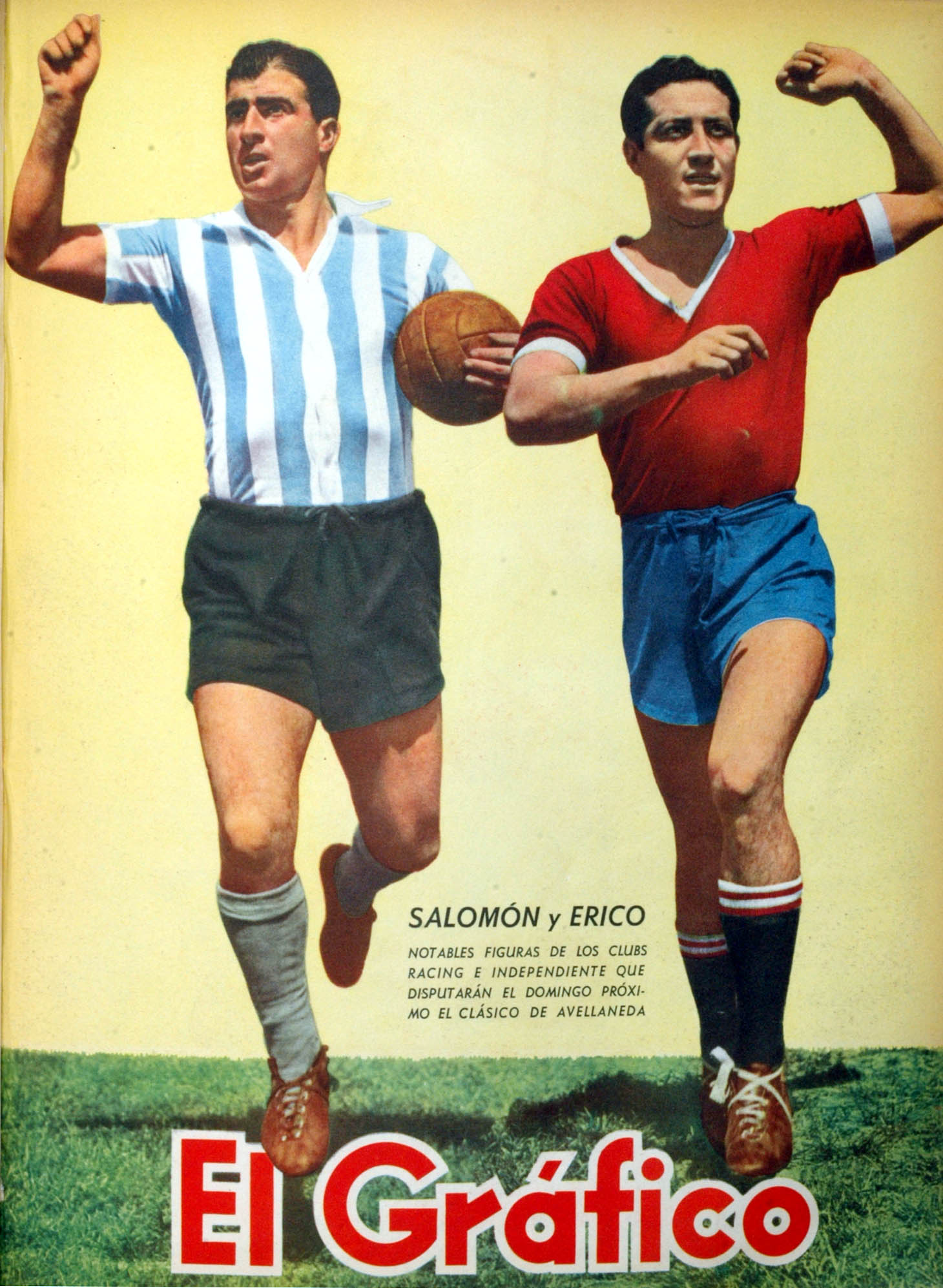 El Grafico del 24 de Octubre de 1941. Edicion 1163